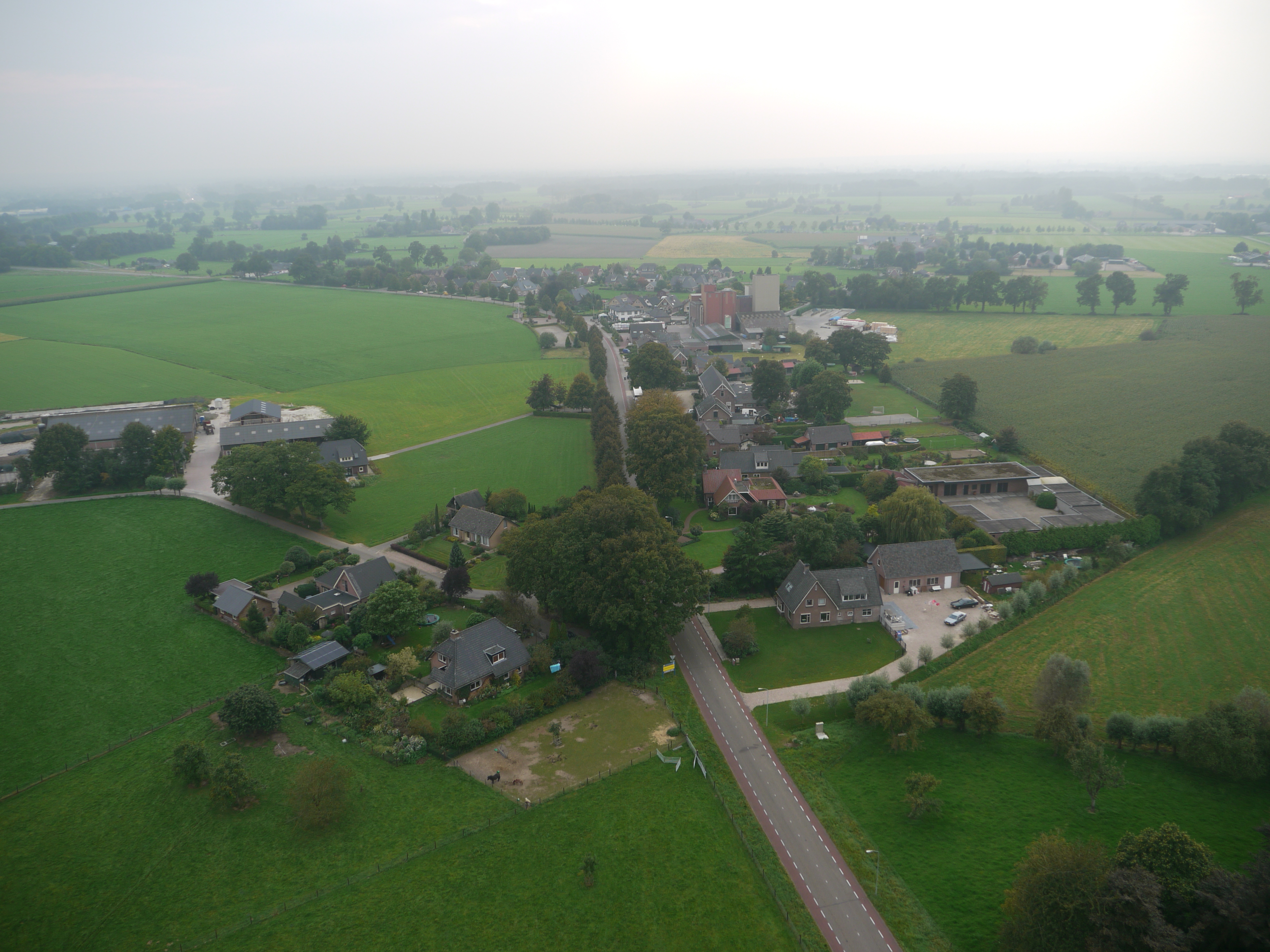 Wilp-Achterhoek vanuit de lucht, gezien vanuit het oost-noordoosten.